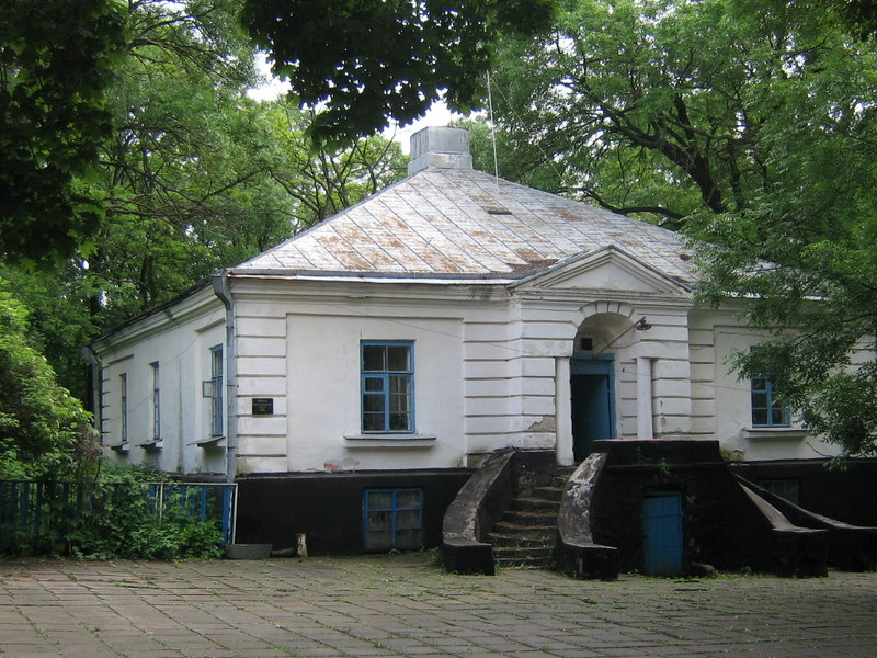 флігель управителя